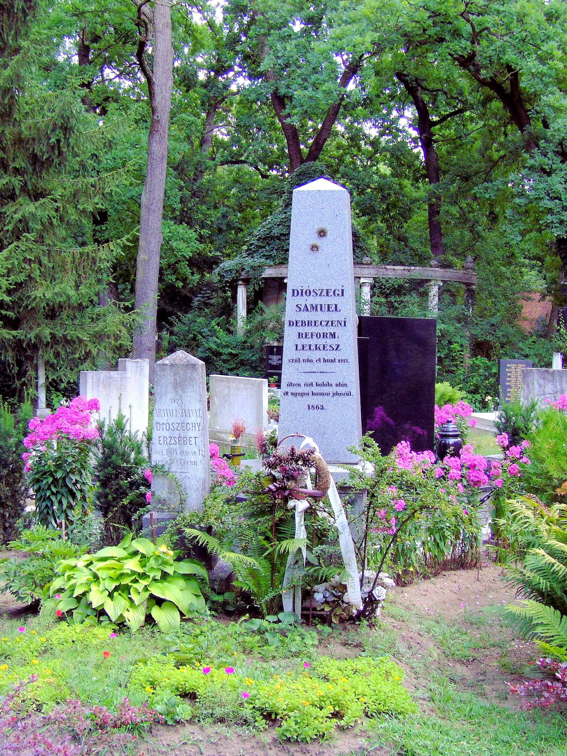 Diószegi Sámuel sírja a debreceni köztemetőben